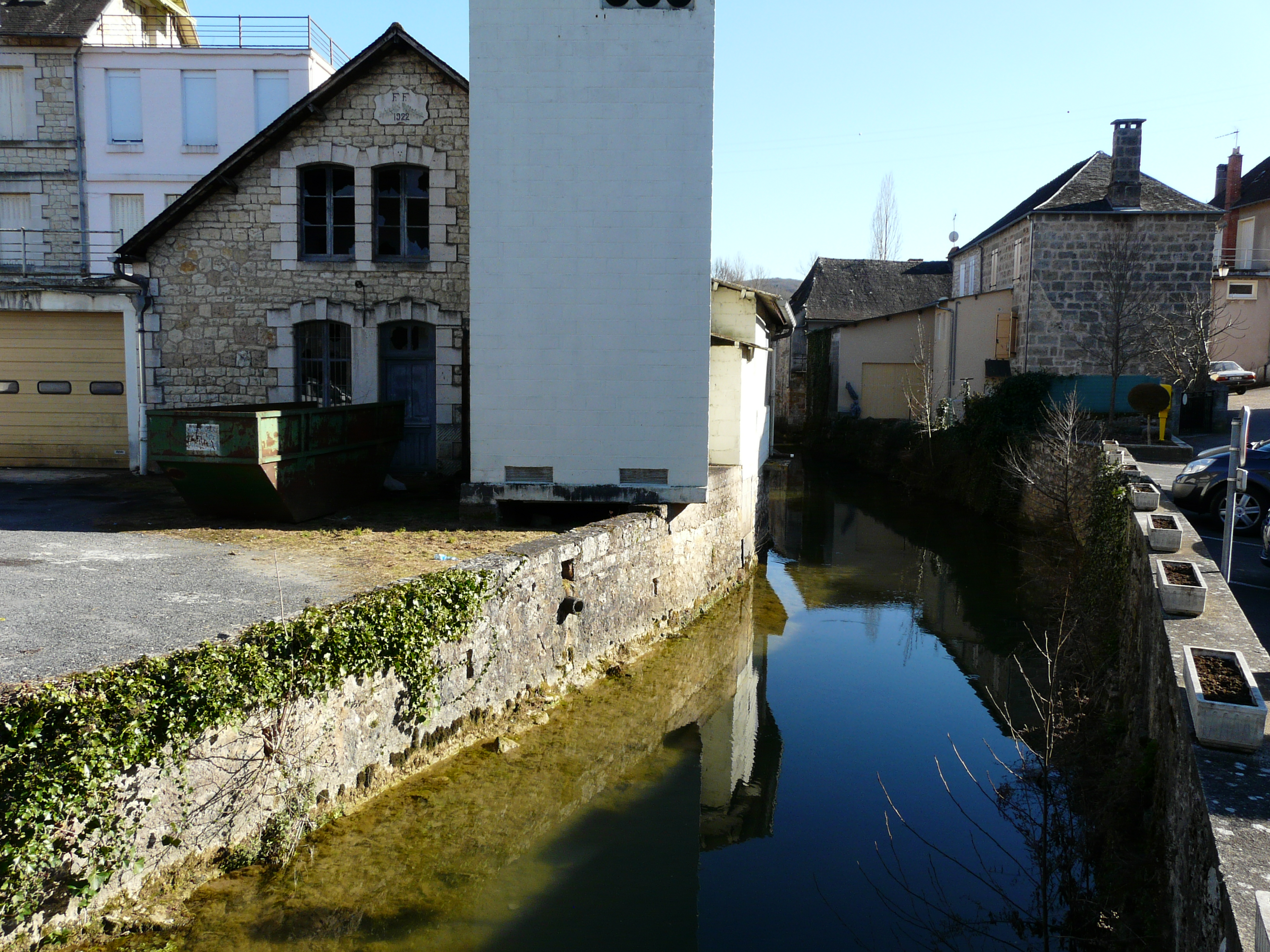 La Couze dans le village de Saint-Cernin-de-Larche, Corrèze, France. Vue prise en direction de l'amont.